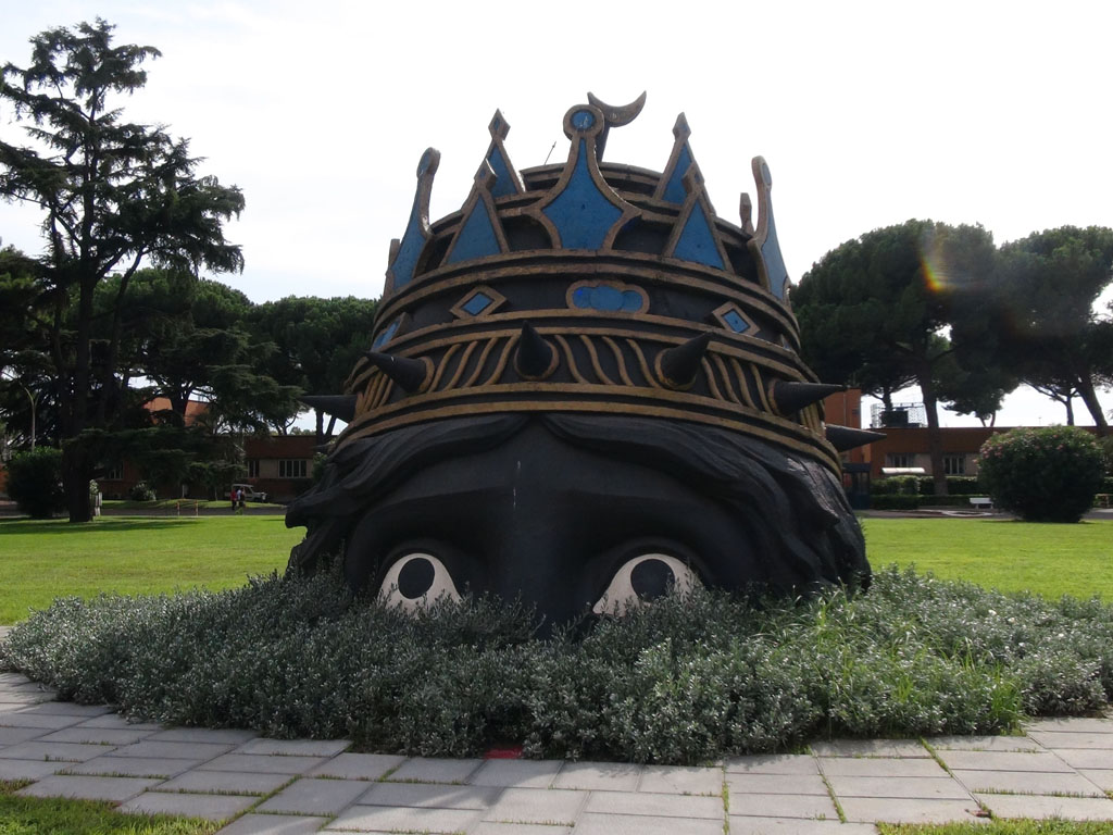 『カサノバ』冒頭に登場する女神像の頭部。チネチッタ撮影所内に展示されている。